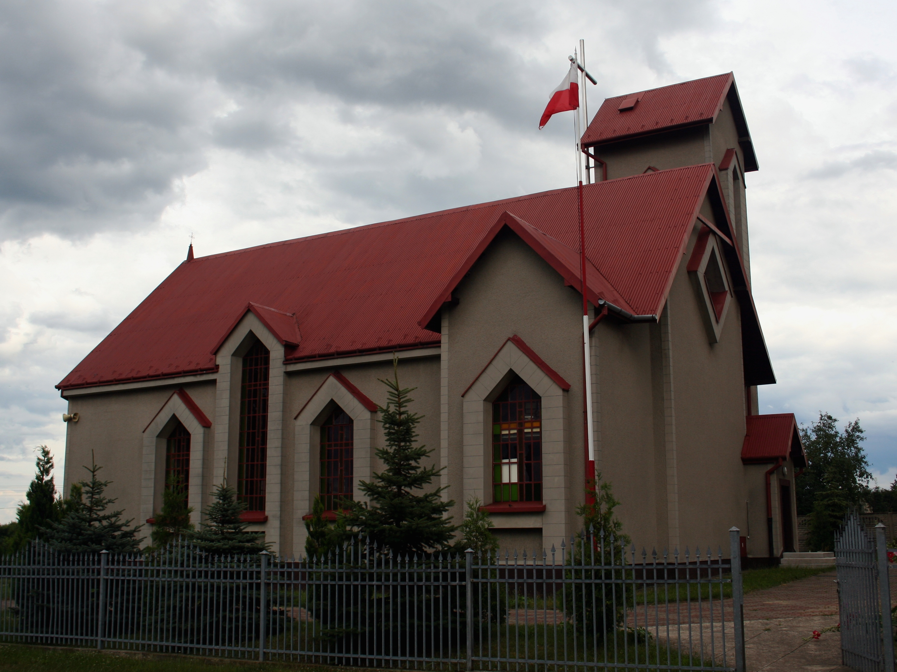 Kościół św. Maksymiliana Kolbego, Aleksandria, woj. śląskie